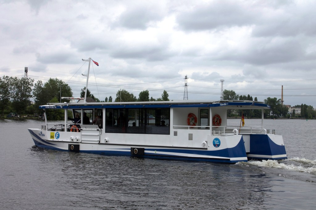 Blick auf die Bb-Seite der Fähre mit den Magnethaltern